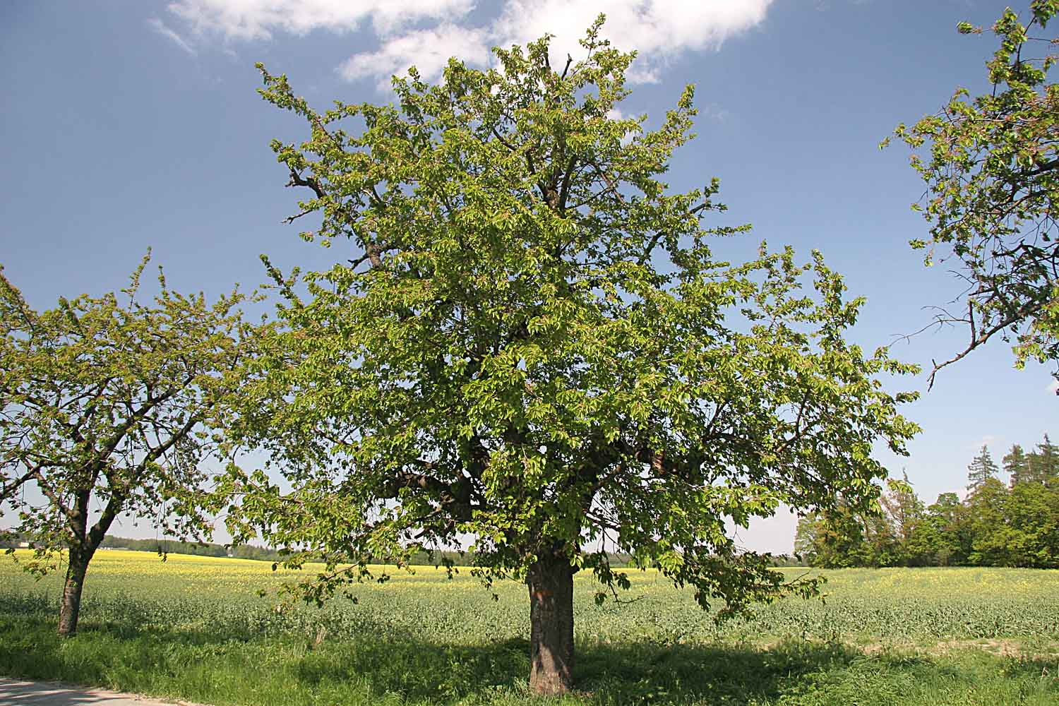 Prunus avium autor Prazak